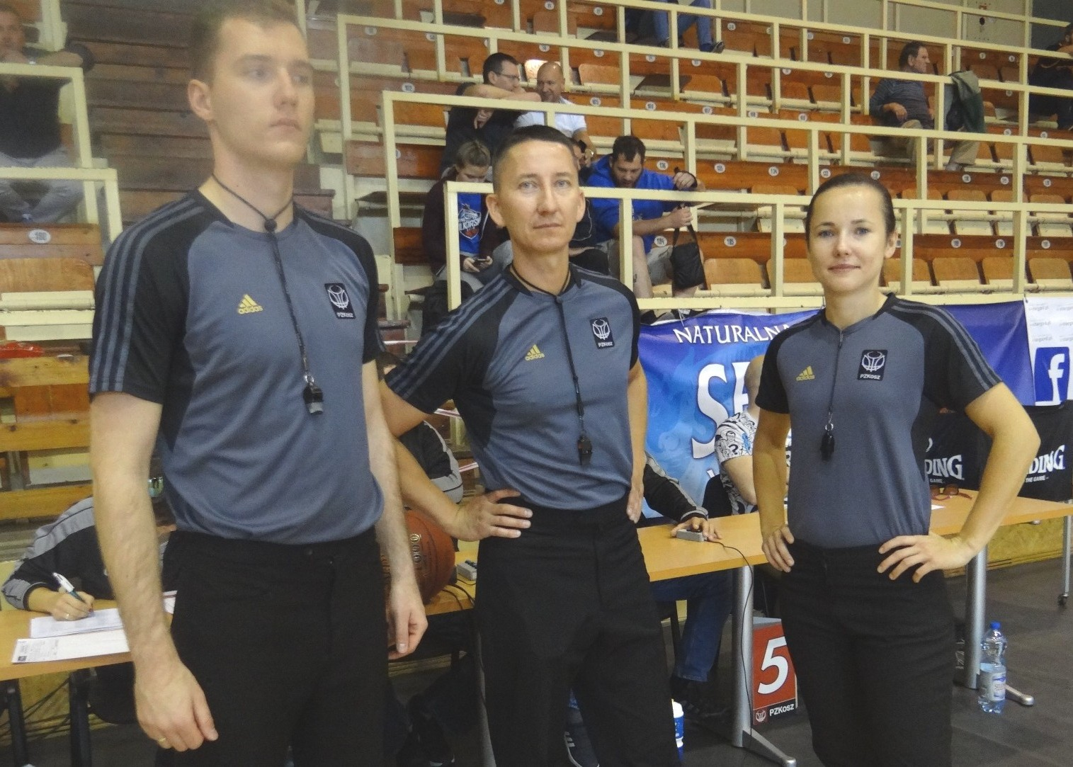 Sędziowie szczecińscy (23.09.2018)